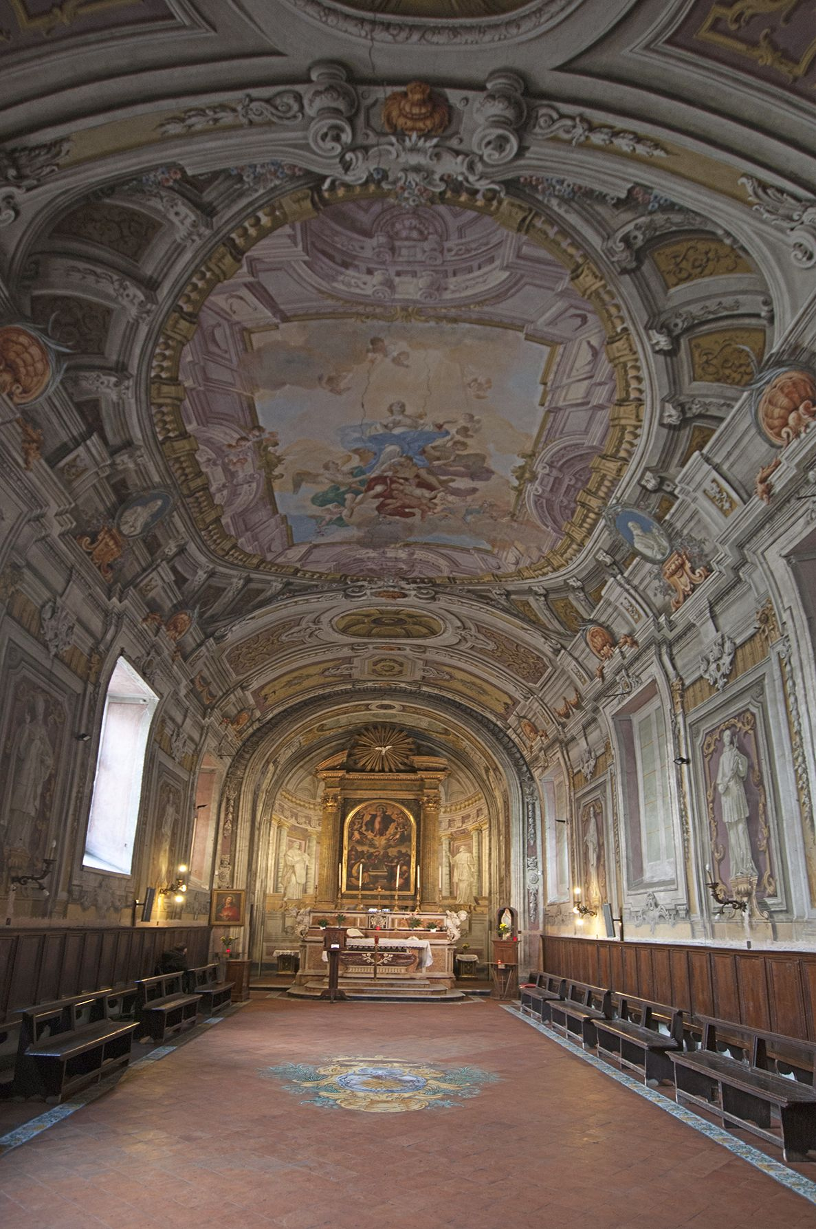 Oratorio dell'Assunta (Napoli)